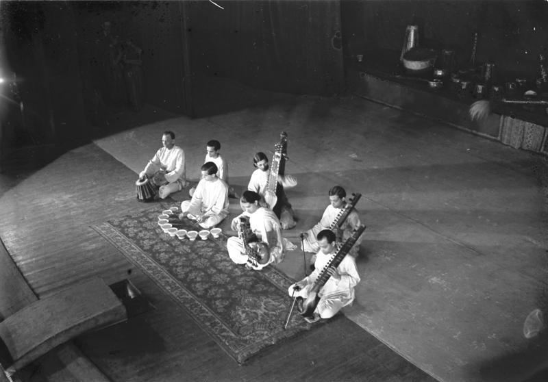 Hindus tanzen und musizieren in Berlin! Die aus sechsundfünfzig Instrumenten bestehende Brahmanen-Kapelle Uday Shan-Kars beim Spiel.